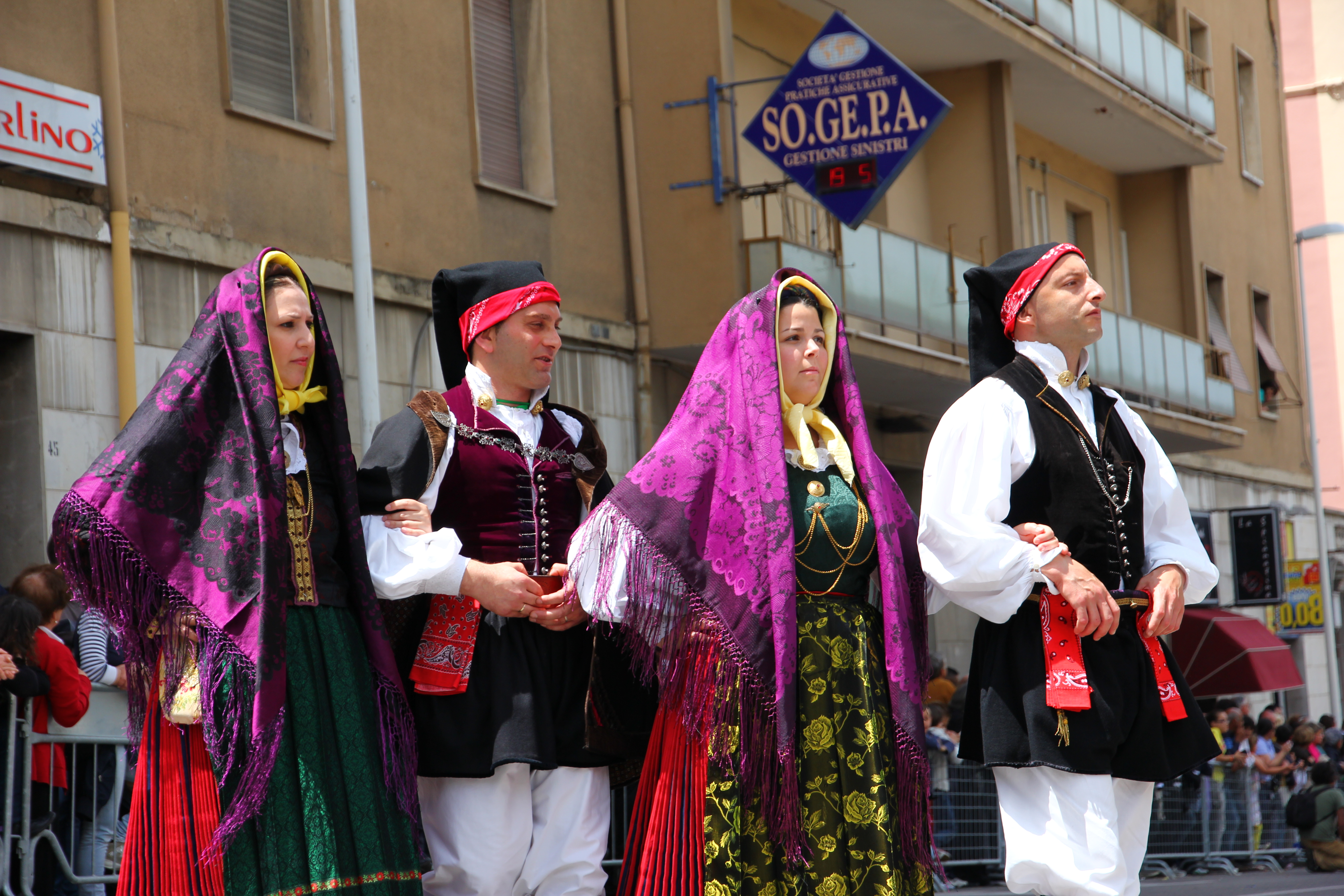 Cavalcata Sarda 2013 (Sassari)